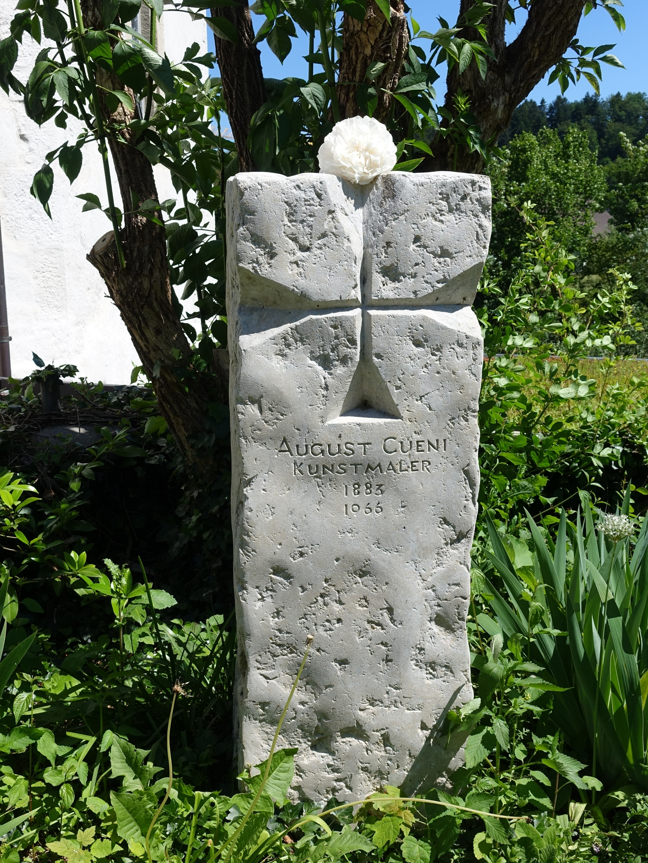 Grab- und Gedenkstein von August Cueni (1883–1966) Kunst Maler, Holz- und Linolschneider, Schlossgasse in Zwingen